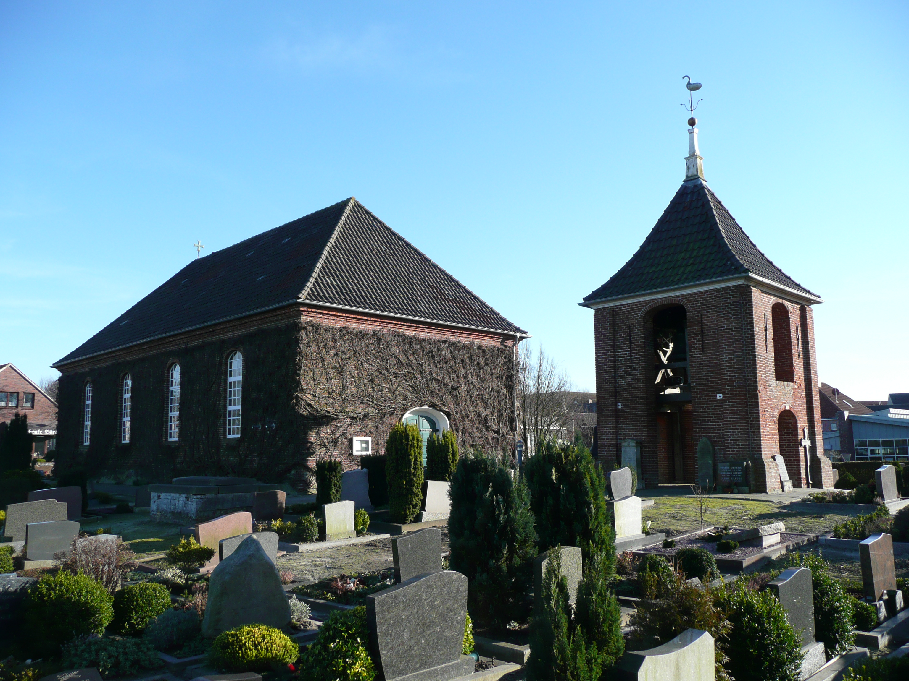 Friedhof und Kirche in Carolinensiel